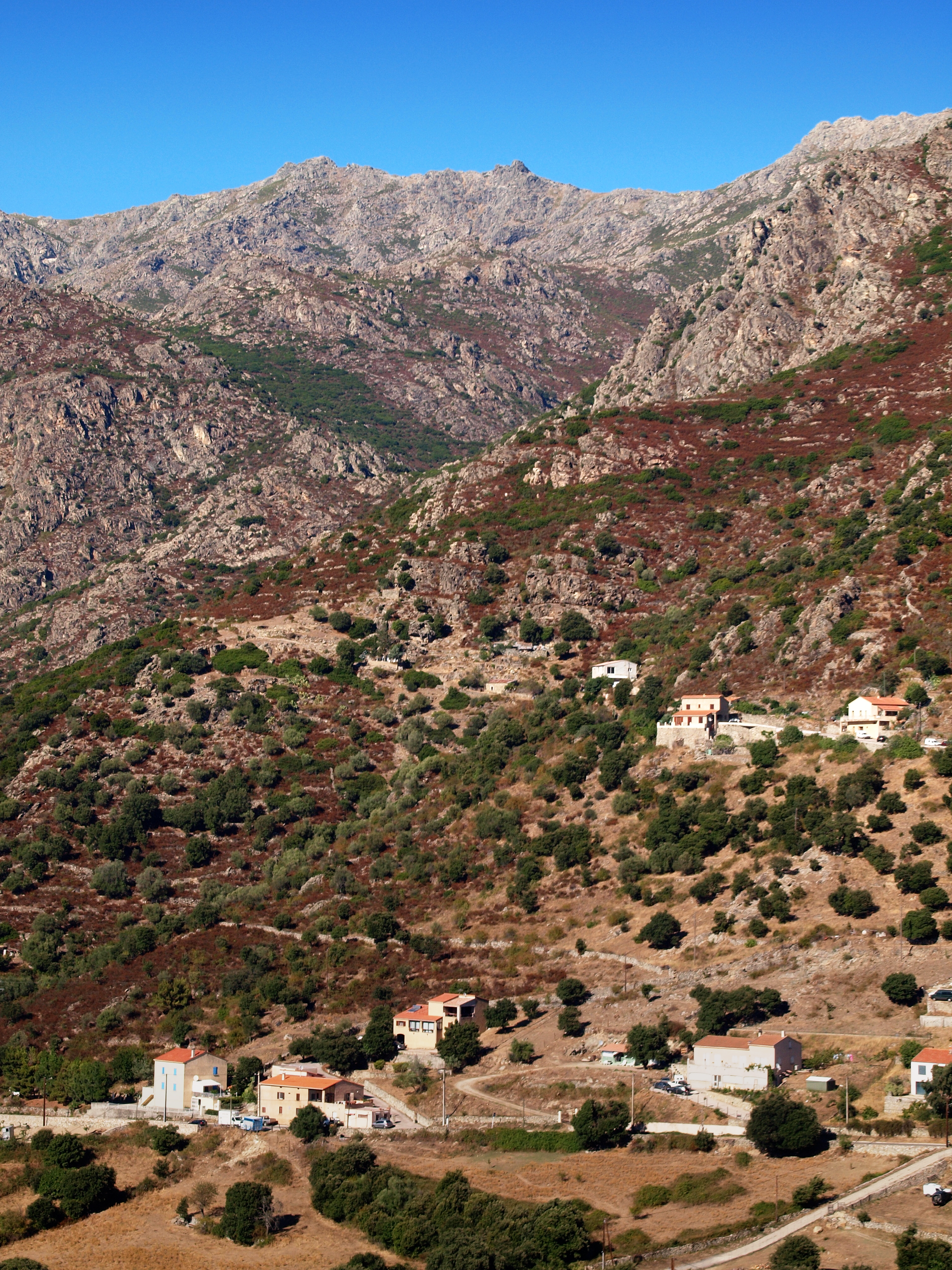 Pietralba (Corsica) - Vue du Monte Astu (à gauche)